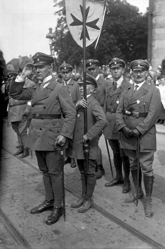 Arthur Mahraun, der Hochmeister des Jungdeutschen Ordens, Vorsitzender der neuen deutschen Staatspartei! Der Vorsitzende der neuen deutschen Staatspartei Hochmeister Arthur Mahraun.